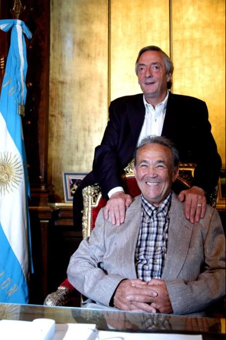 El presidente Néstor Kirchner recibió a Juan Carlos Livraga, uno de los civiles sobrevivientes de la masacre del basural de José León Suárez en junio de 1956. Casa Rosada, Despacho Presidencial.